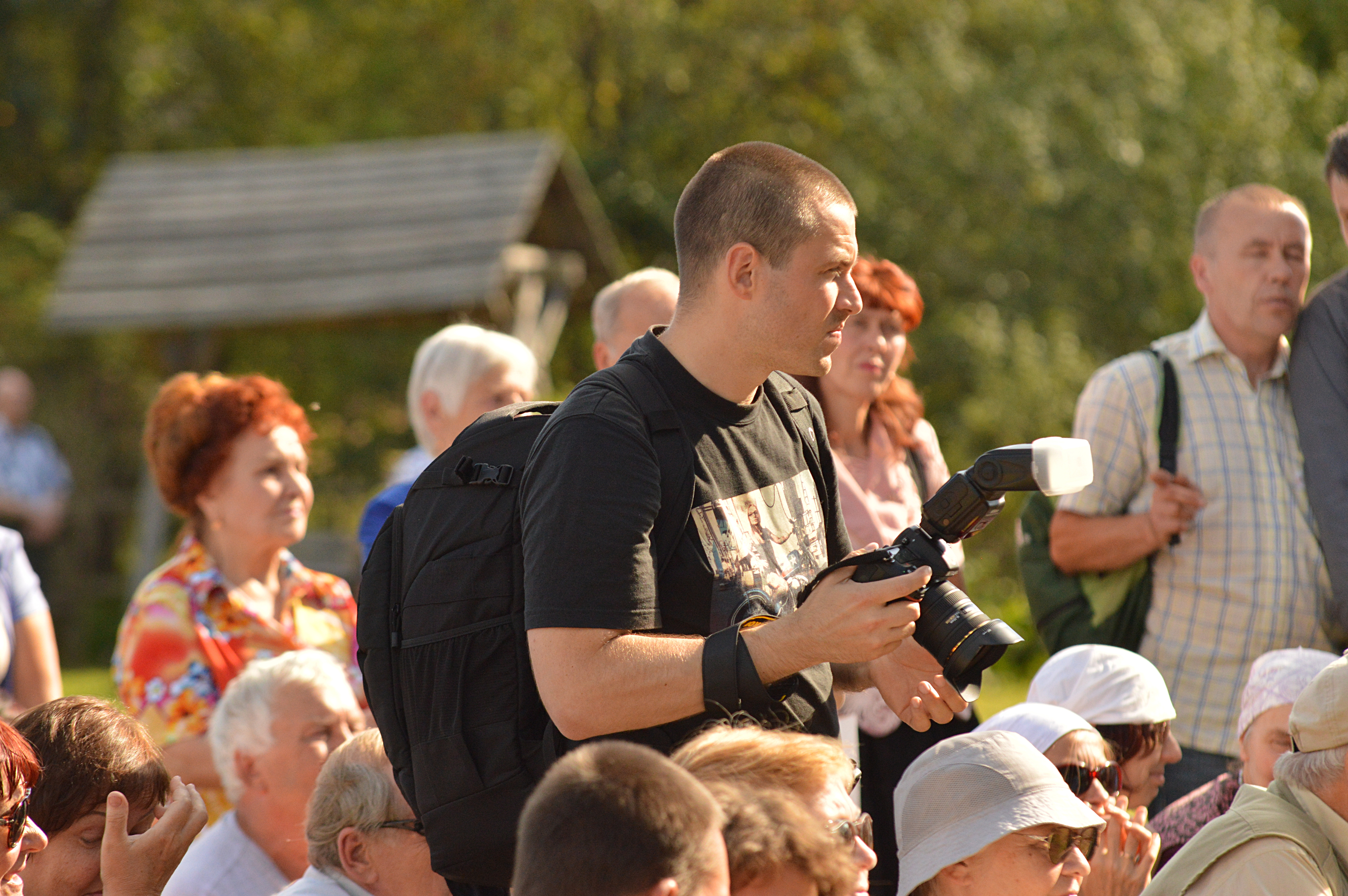 Aleksandr Abrosimov Radaja Seto Festivalil.